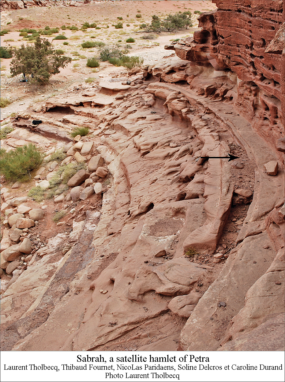 Caniveau d'évacuation des eaux de ruissellement en haut des marches du théâtre.